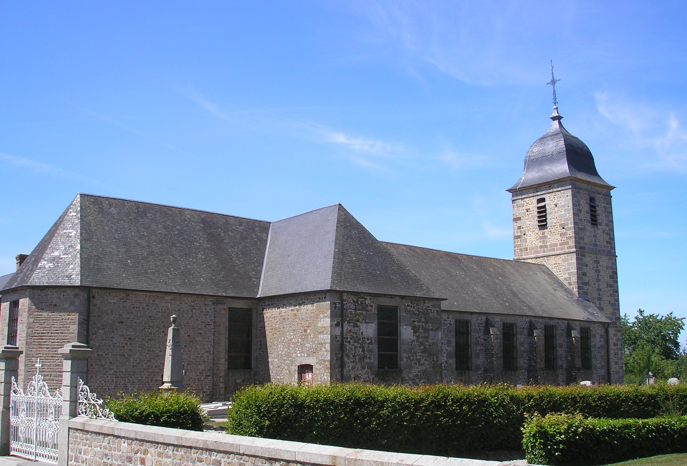 Saint-Charles-de-Percy (Normandie, France). L'église Saint-Charles.